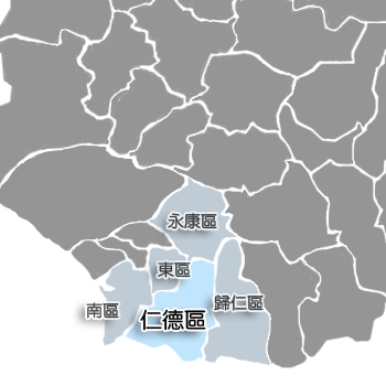 中文（台灣）: 仁德區相對位置。